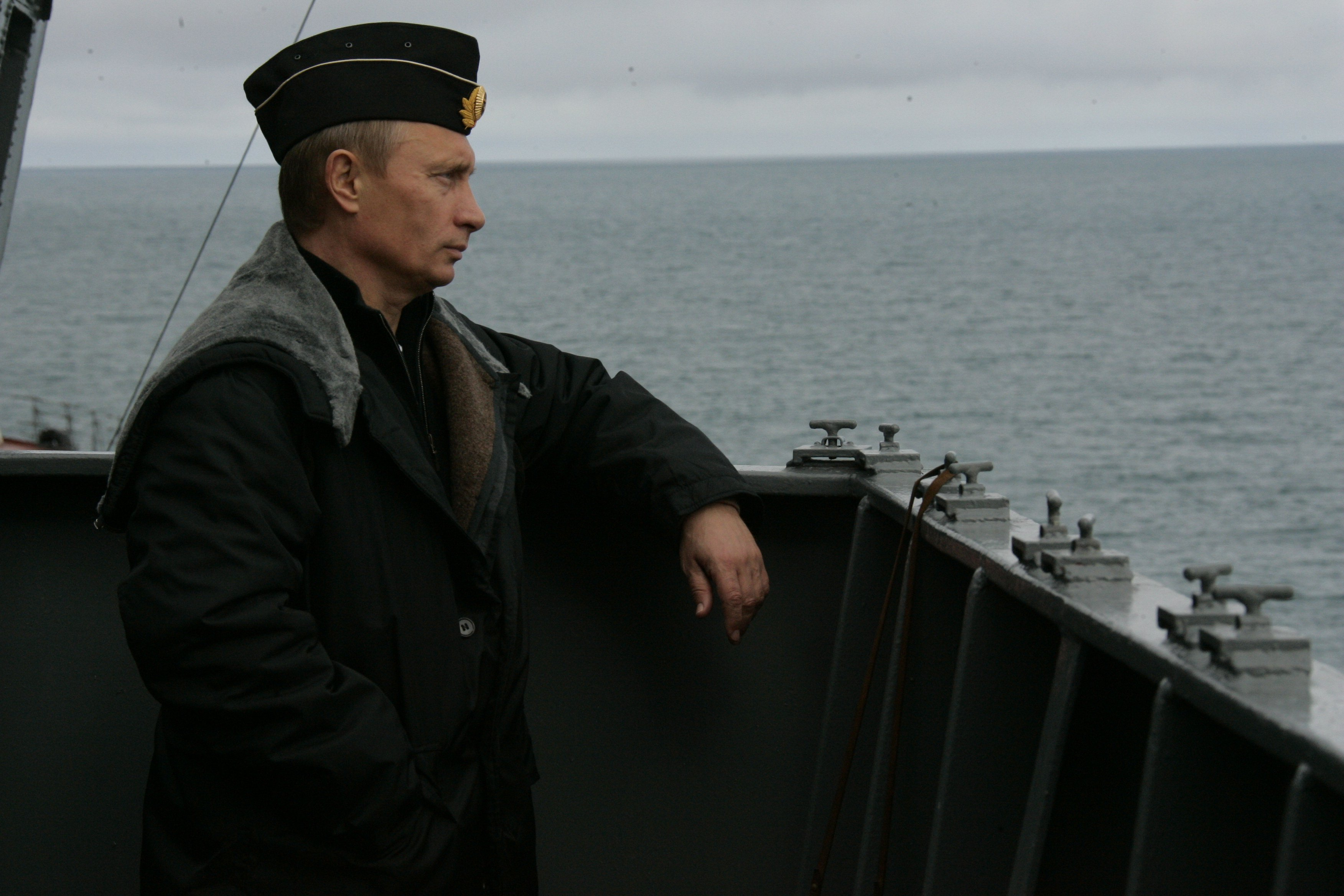 БАРЕНЦЕВО МОРЕ. Владимир Путин на борту тяжелого атомного ракетного крейсера «Петр Великий» в ходе учений Северного флота. На палубе.